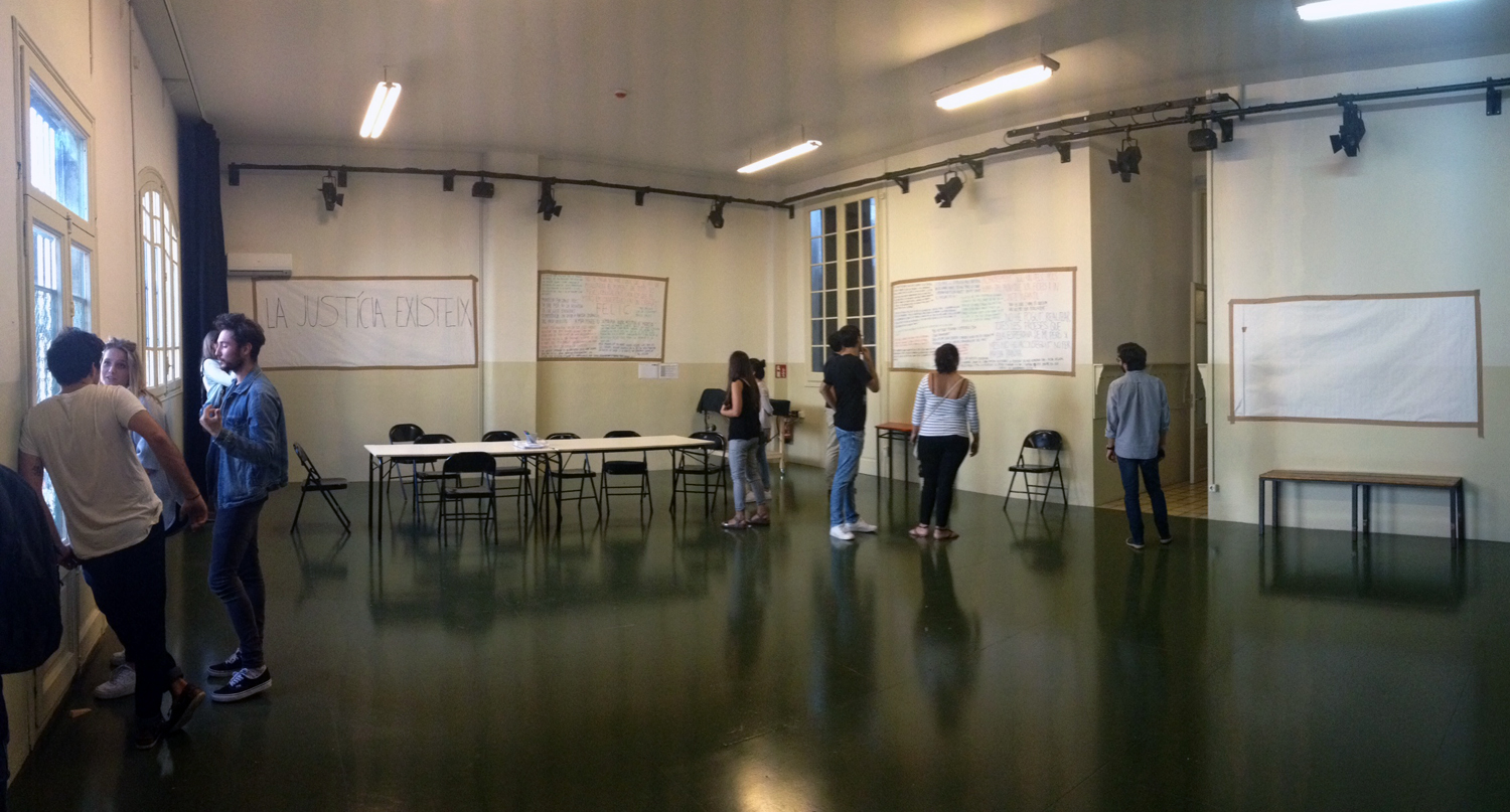 Aula del nuevo Obrador de la Sala Beckett de Barcelona en Pueblonuevo.